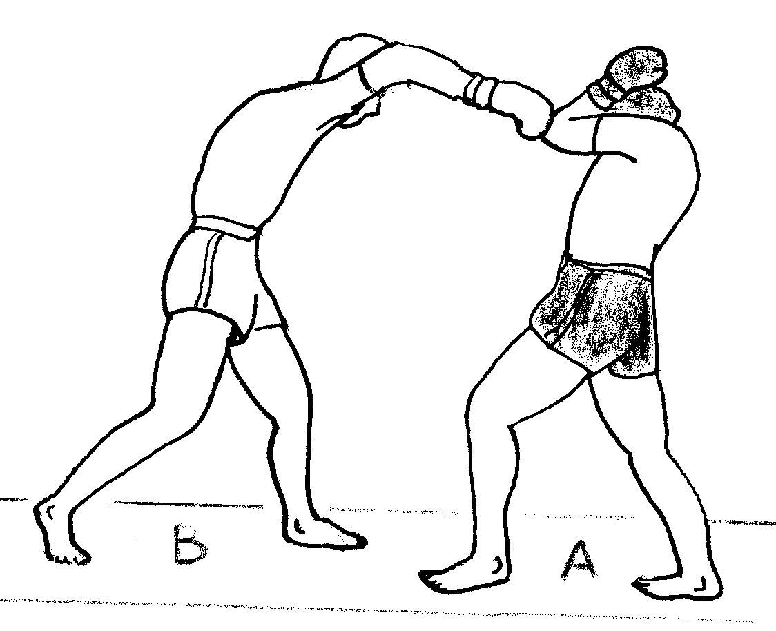 drop0.jpg